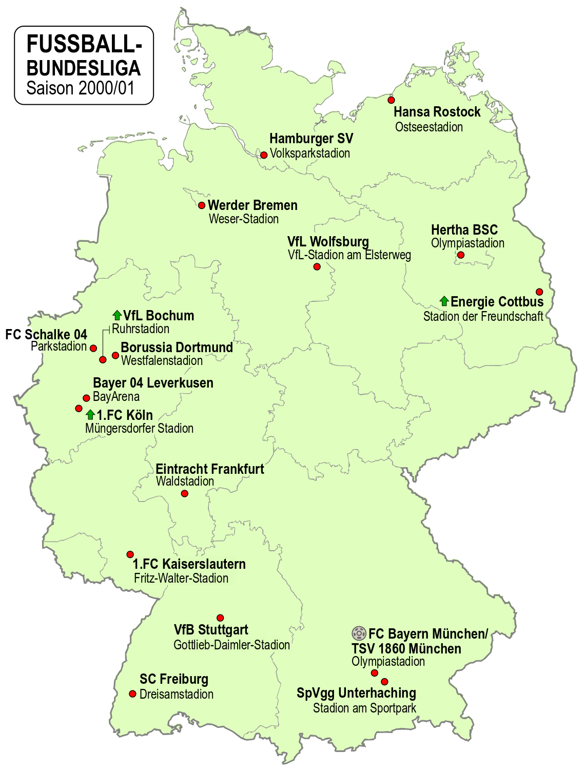 Karte der Vereine der Fussball-Bundesliga-Saison 2000/01